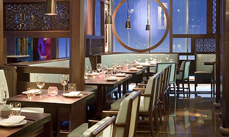 Hakkasan. Abu Dhabi. Chef Lee Kok Hua. United Arab Emirates. September 2010.